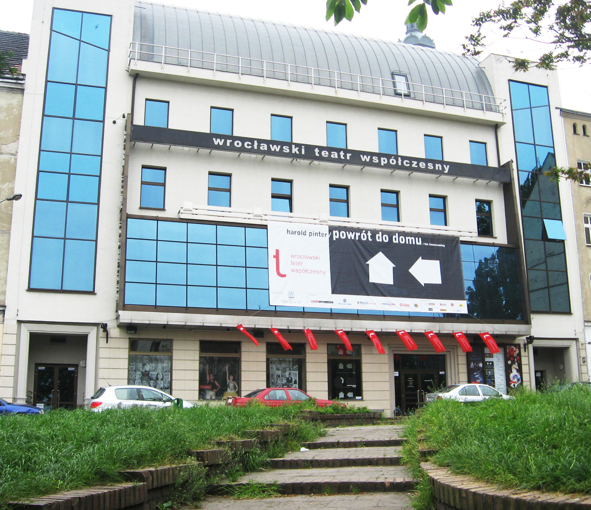 Budynek teatru współczesnego